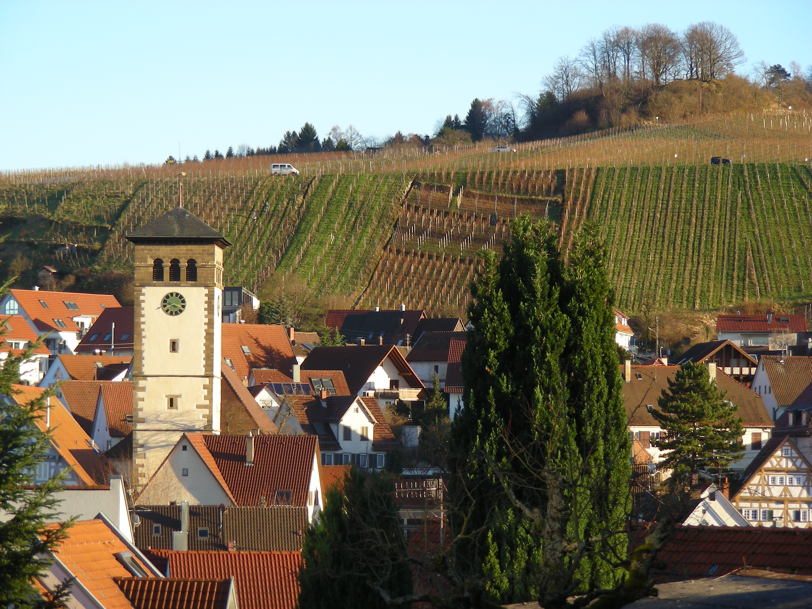 Vorfrühlingstag am 13. Jan. 2015